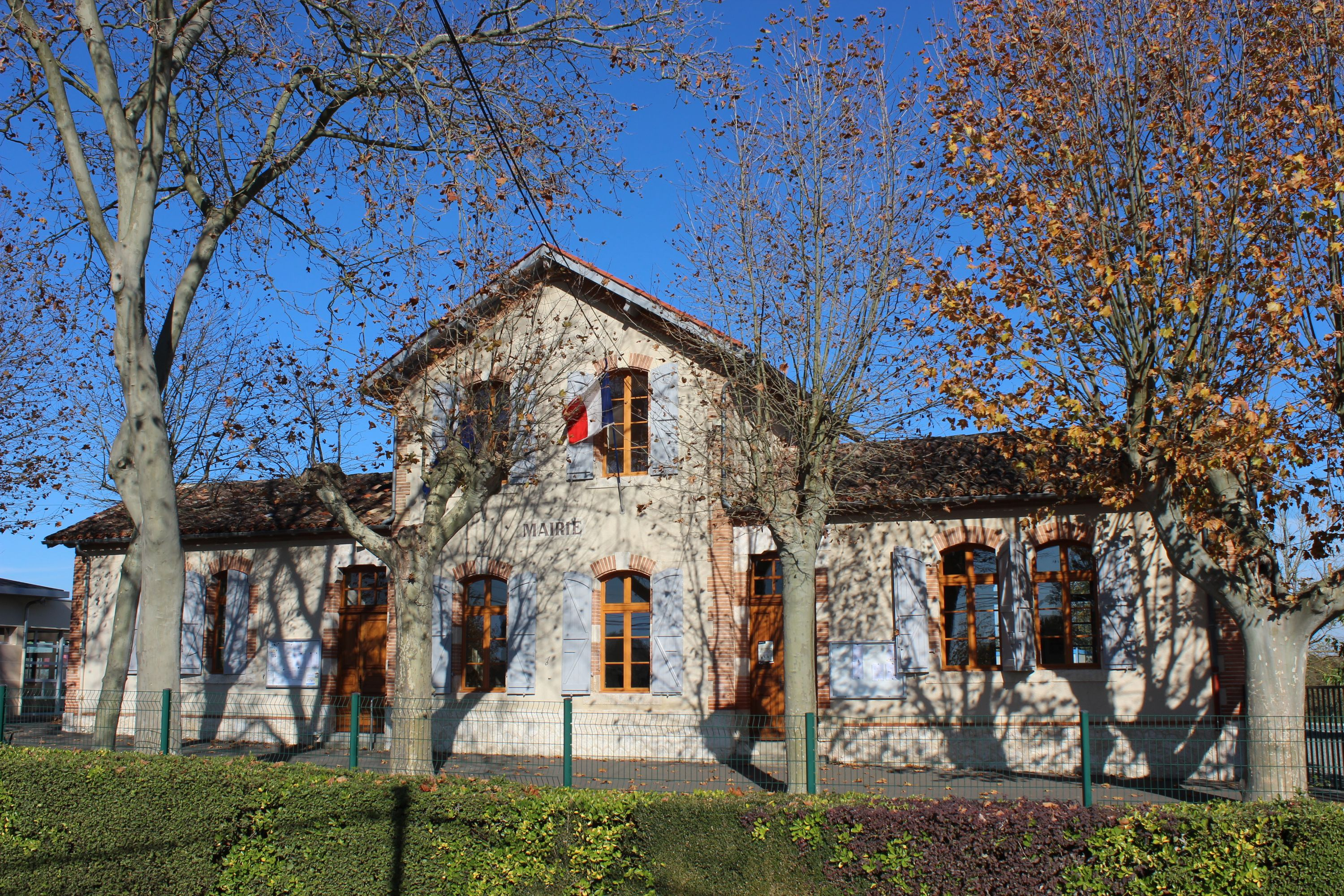 School